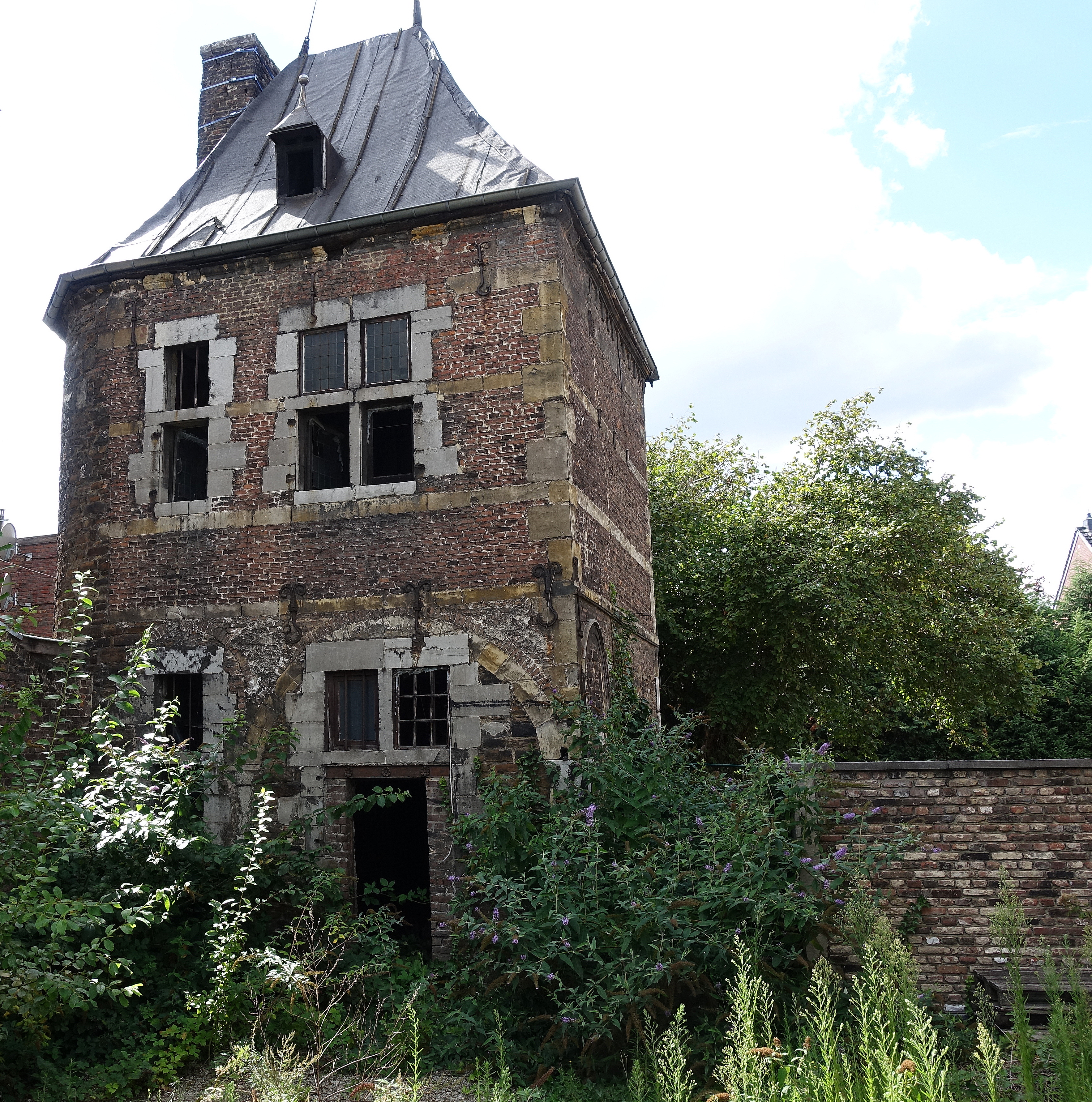 Tour de Pepin in Herstal uit de 16de eeuw, overblijfsel van het vroegere kasteel van Hanxheller